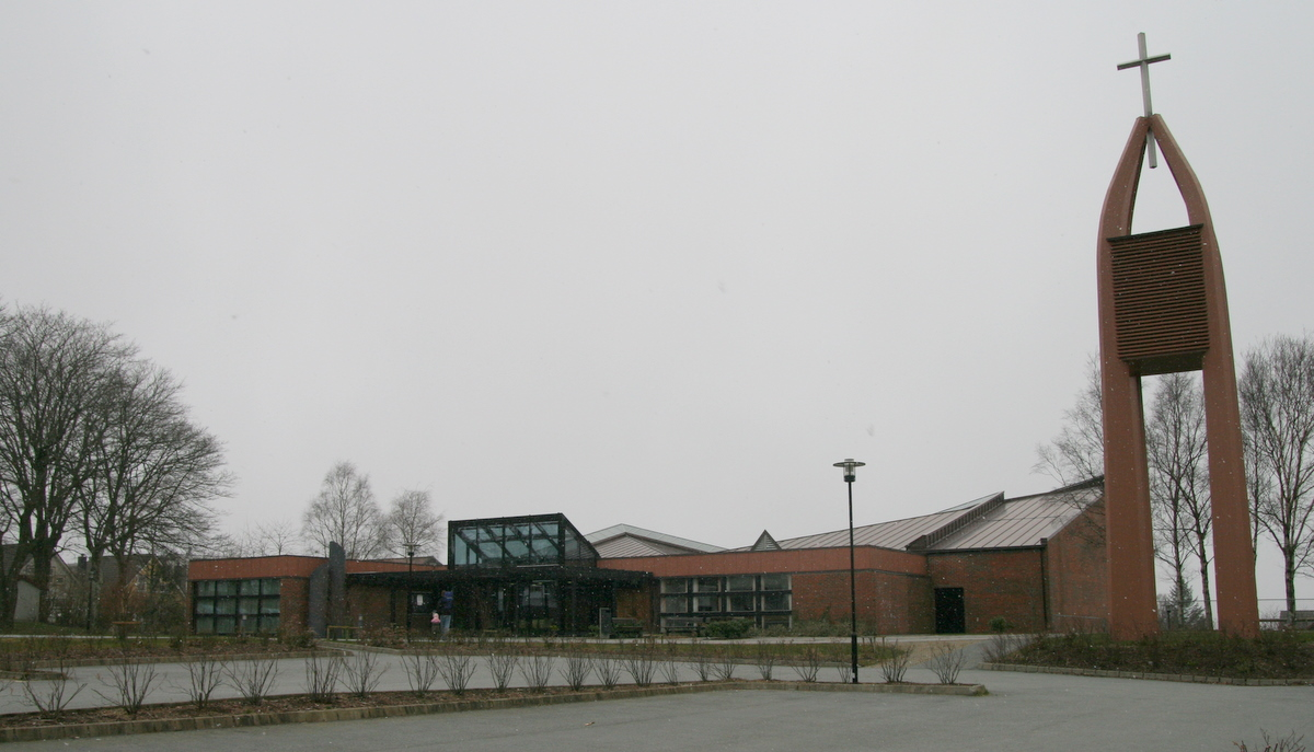 Tjensvoll_kirke